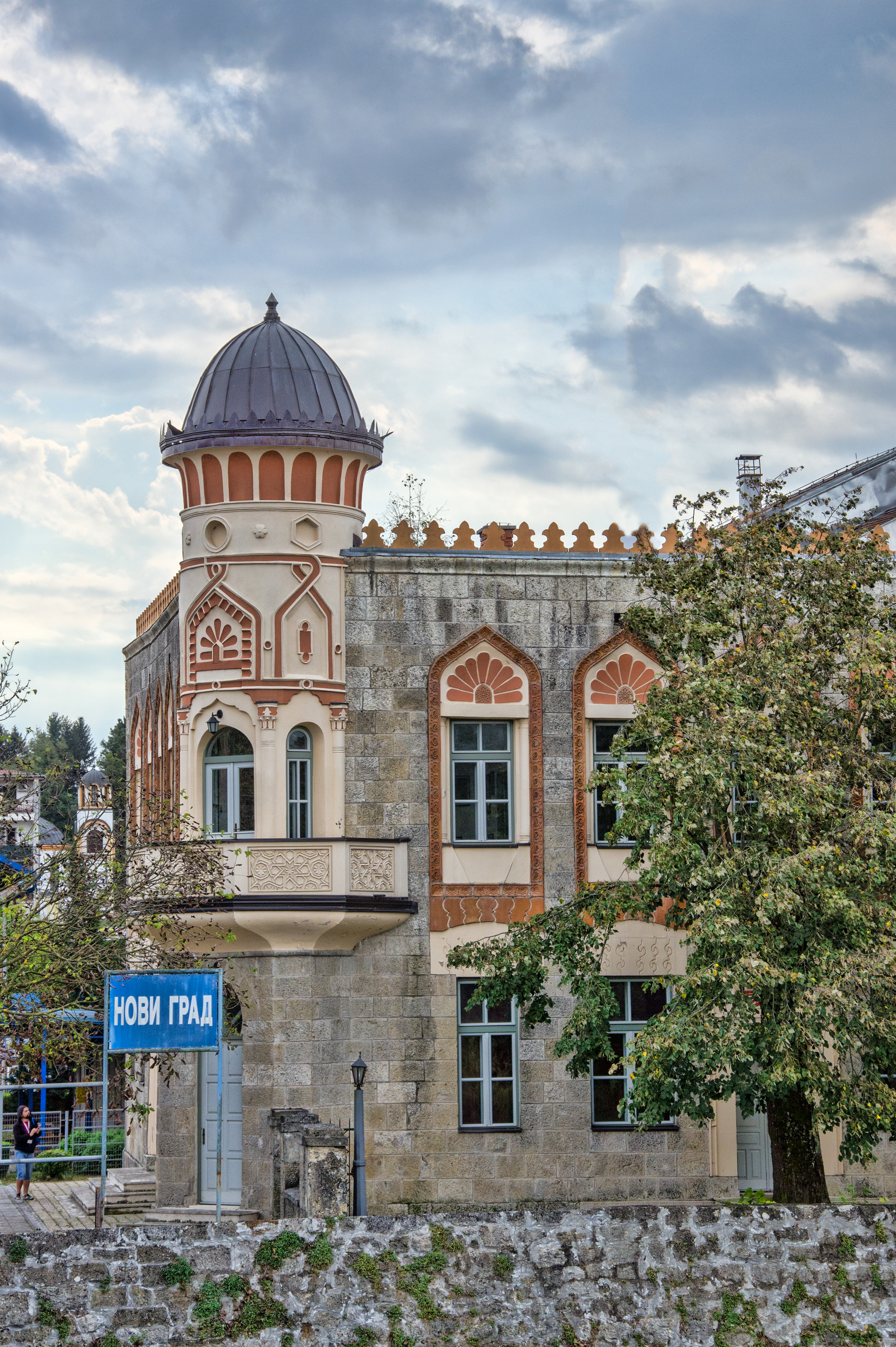 This image was uploaded as part of Trace of Soul 2018.